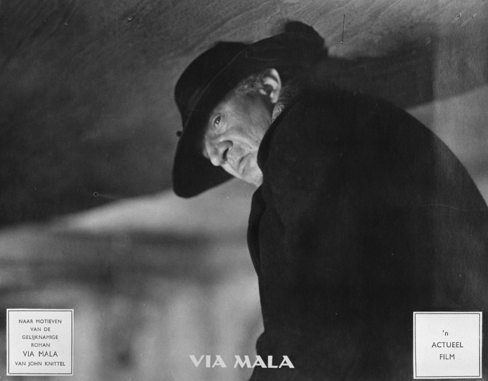 Actueel film repros Via Mala, Carl Wery